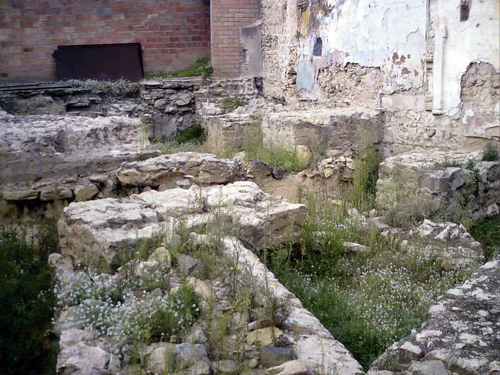 Anfiteatre Romà de Badalona, Badalona, Barcelonès, (Catalunya).